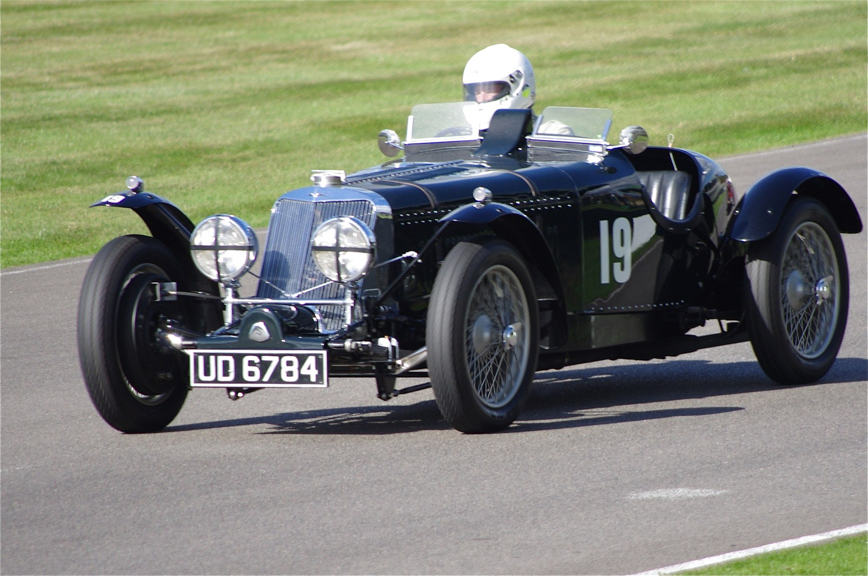 Goodwood Revival 2012